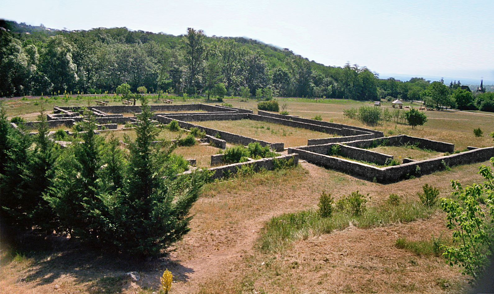 Villa Rustica Szentendre-Skanzen (Ungarn): Ansicht.